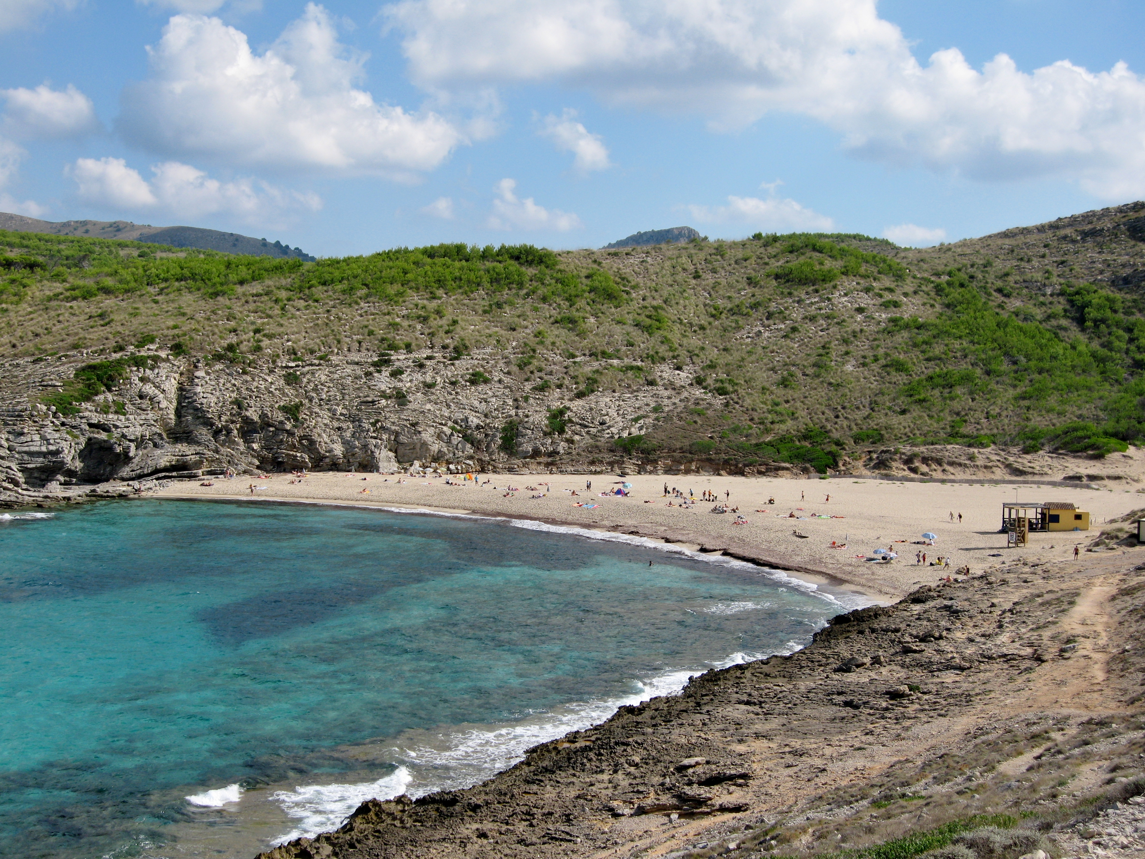 Cala Torta, Gemeinde Artà, Mallorca, Spanien